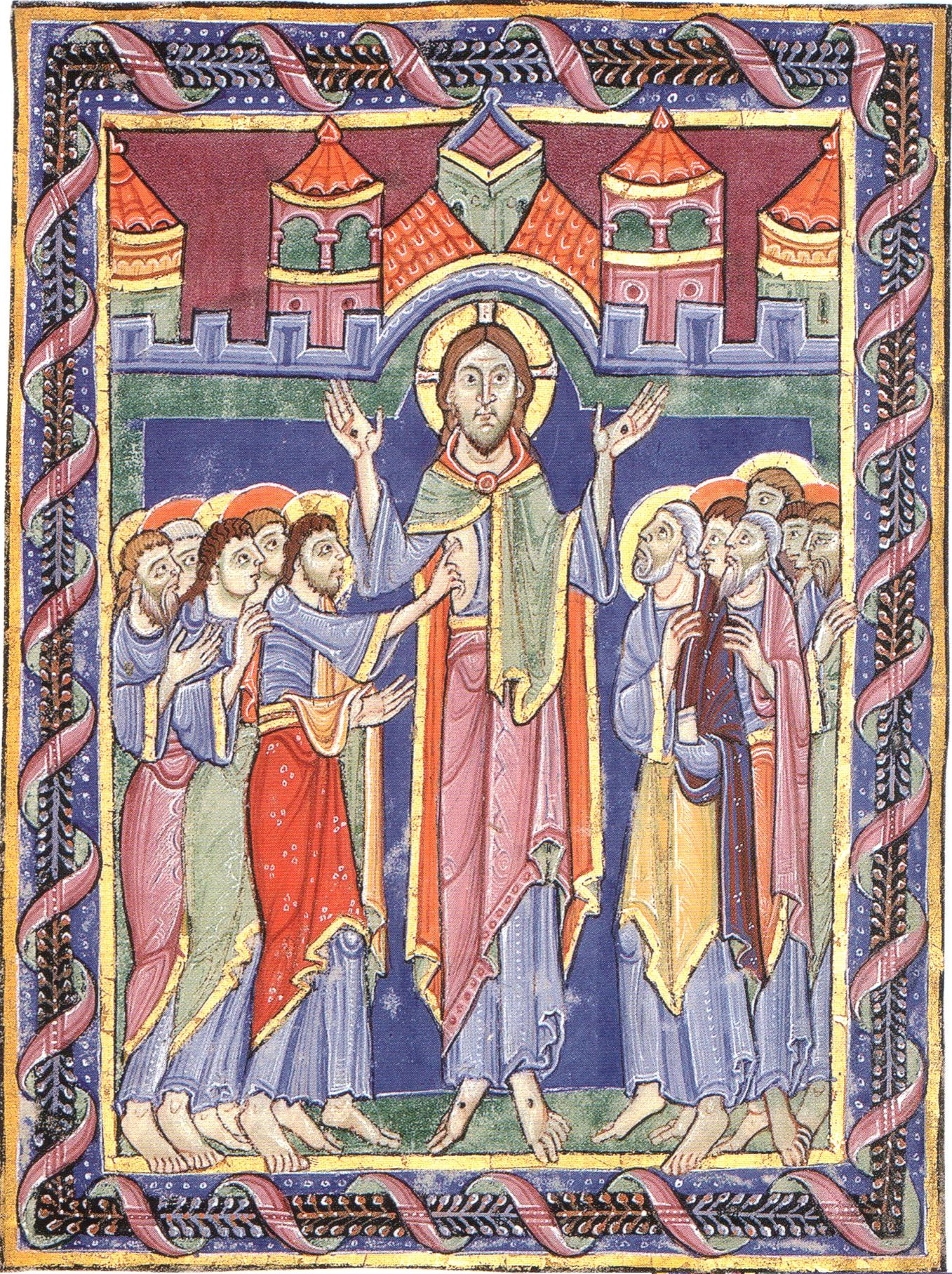 Albani-Psalter, Erscheinung des Auferstandenen am achten Tag (Joh. 20,26-29)